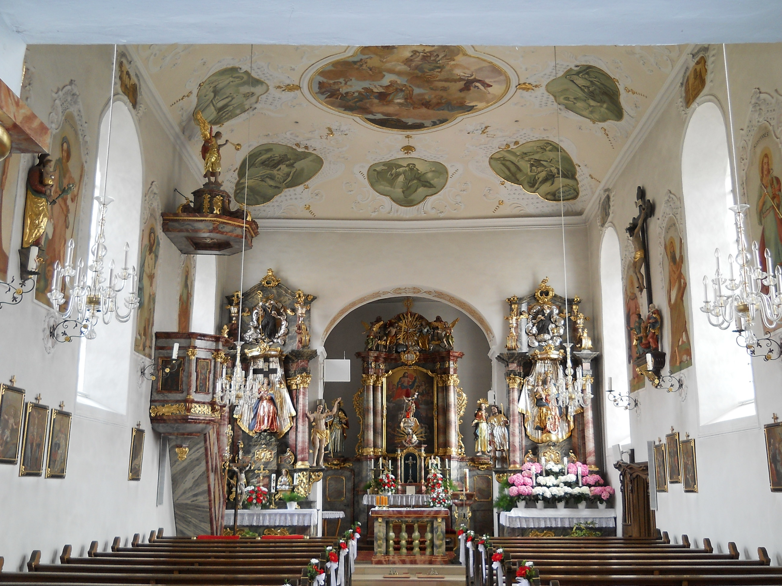 Daiting, Landkreis Donau-Ries, Bistum Augsburg, Pfarrkirche St. Martin, Inneres gegen Osten